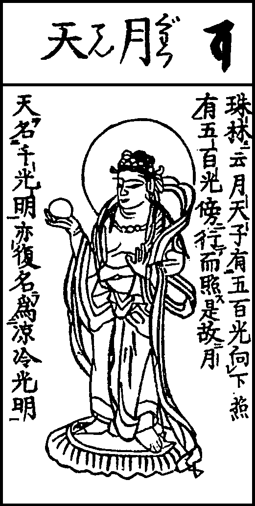 『仏像図彙』による月天 This image is available from the website of the National Diet Library This tag does not indicate the copyright status of the attached work. A normal copyright tag is still required. See Commons:Licensing. English | 日本語 | +/−